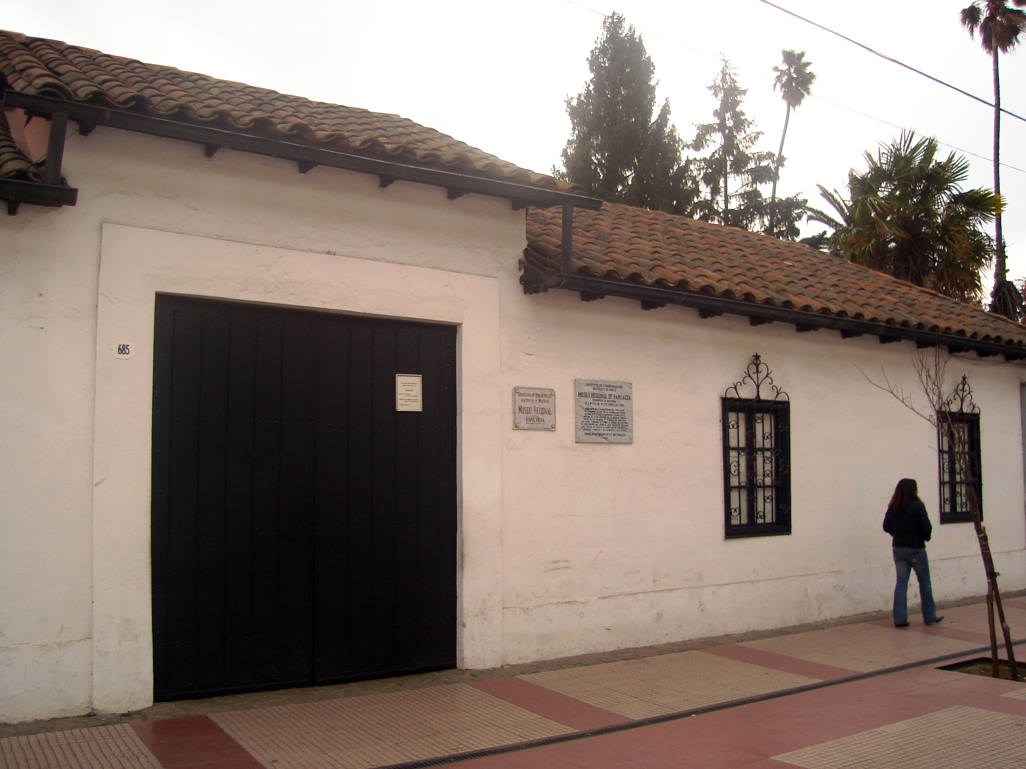 Casa del Ochavo, Rancagua This is a photo of a national monument in Chile: 361